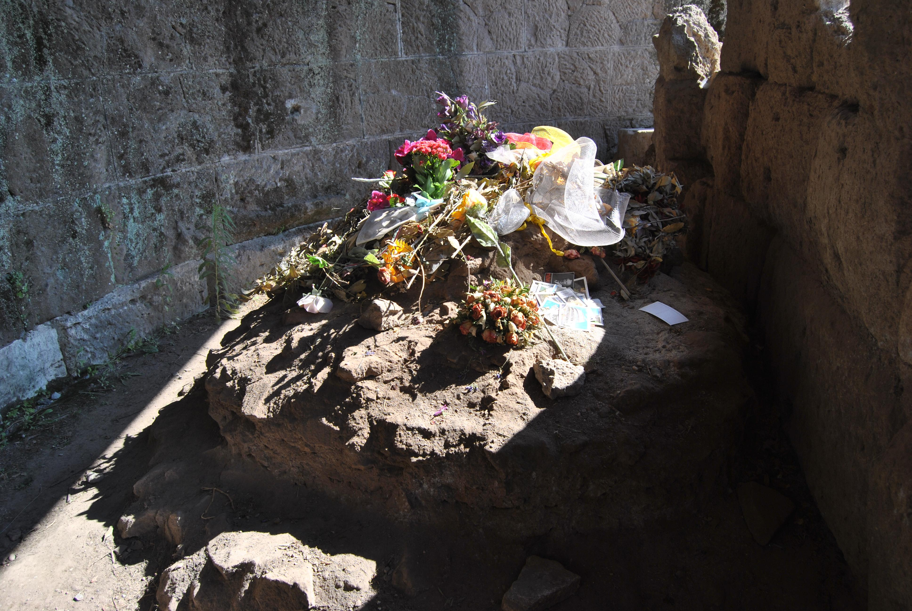 Tumba de Julio César en el Foro Romano.